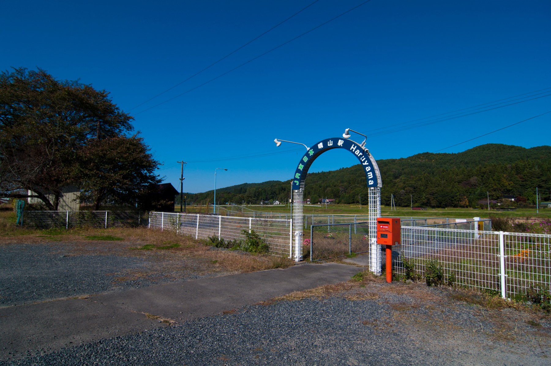 東日本旅客鉄道釜石線晴山駅